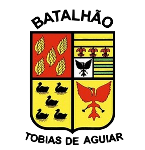 Brasão do 1.º Batalhão de Polícia de Choque-BTA da Polícia Militar do Estado de São Paulo, Brasil.